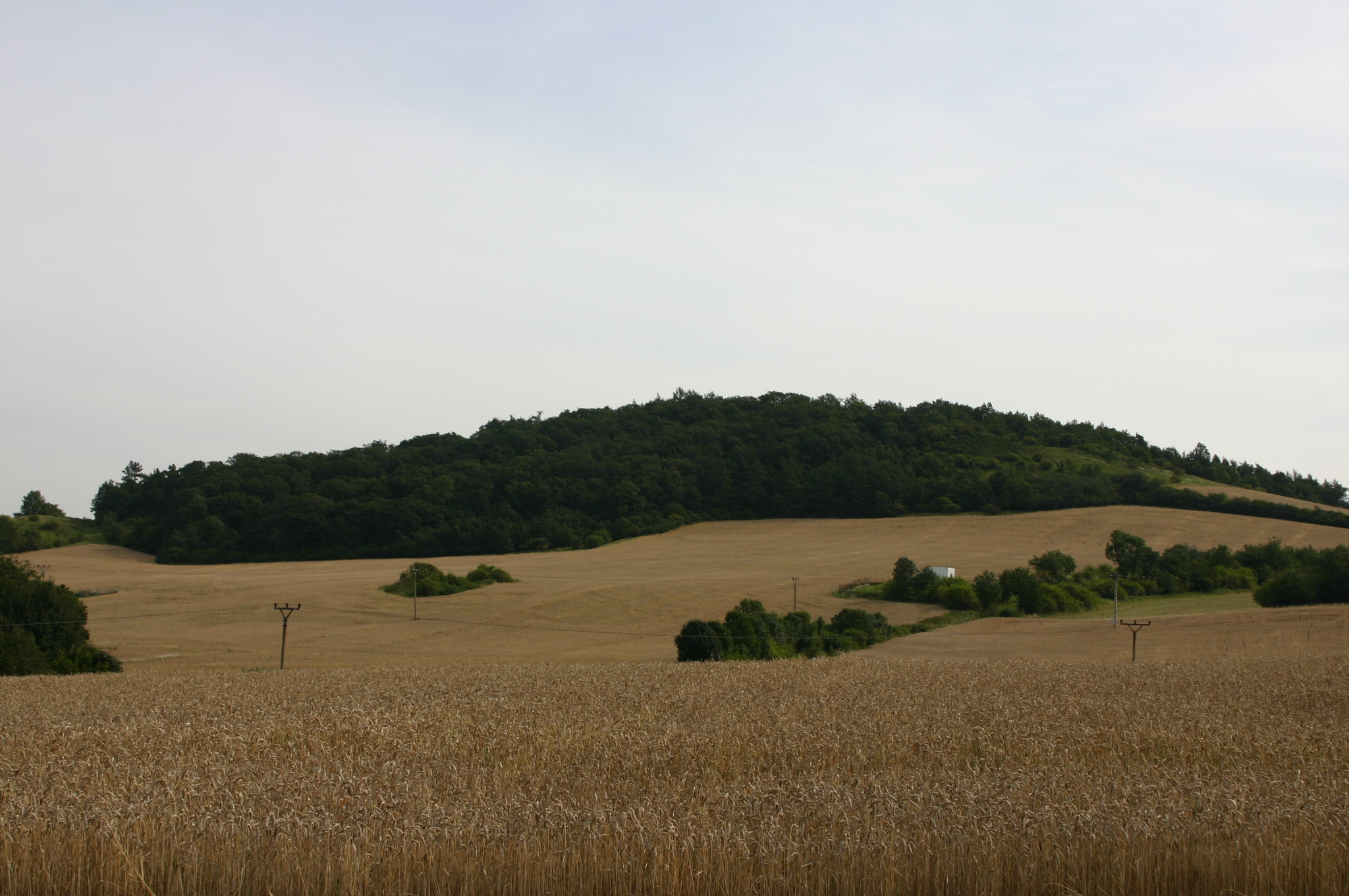 Kopec Dob na hranicích okresů Most a Teplice